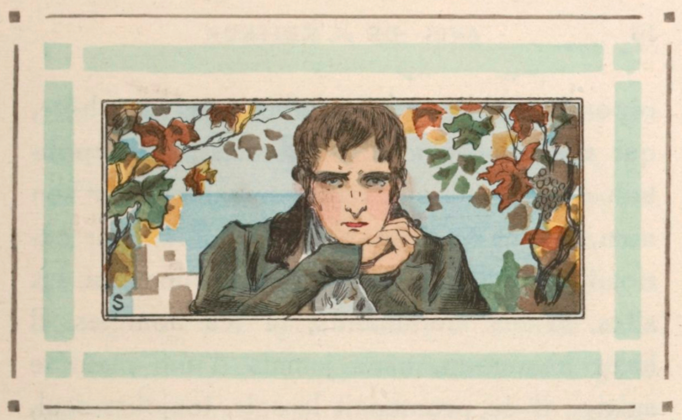 Benjamin Constant, "Adolphe" (1816), illustration de Serge de Solomko, éd. F. Ferroud, 1913, page 9